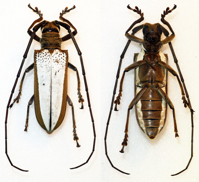 Breuning,1948 Sex: Male Data: 04-2013 - Sabah - Borneo Size: ?